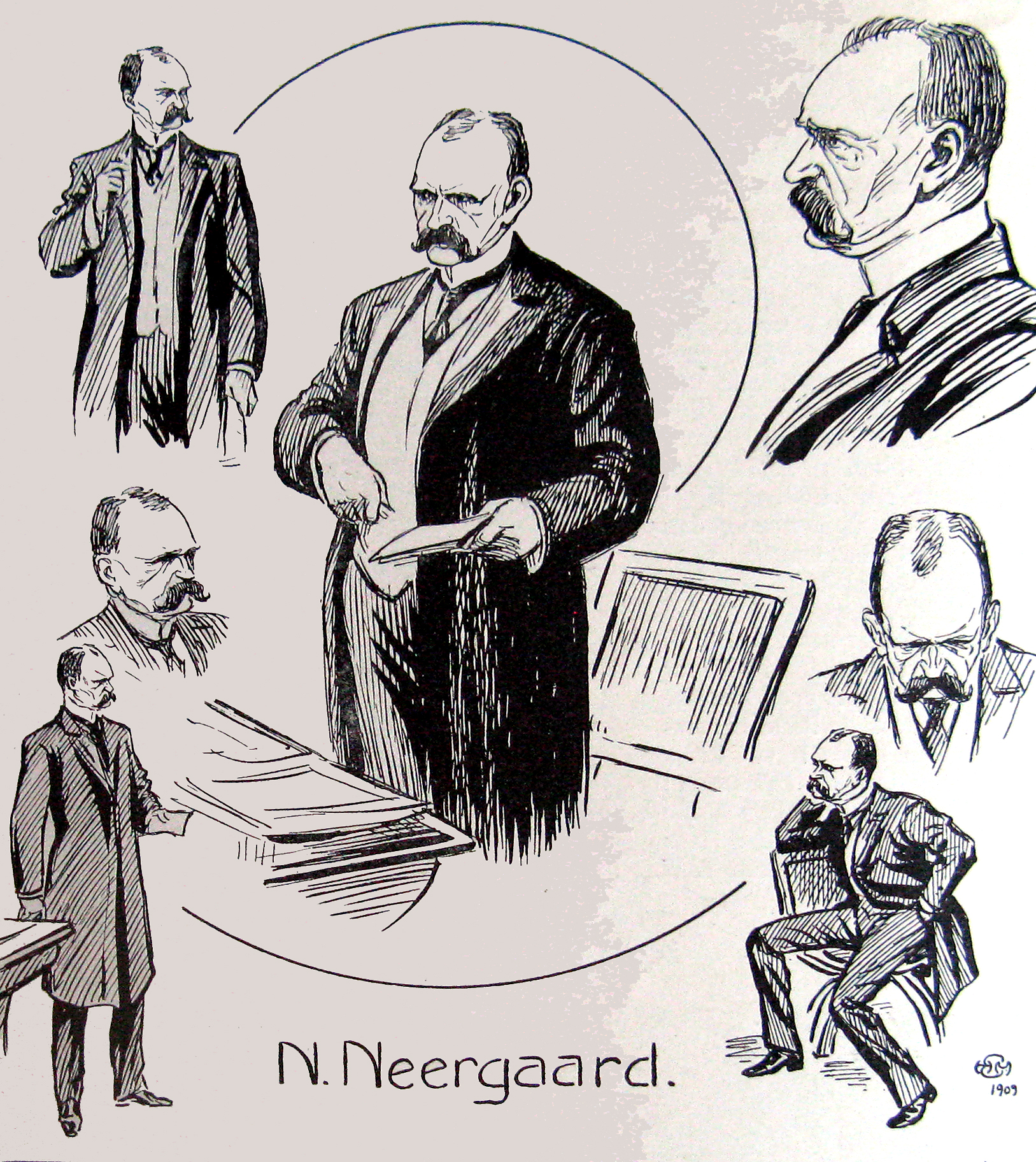 Niels Neergaard under fremlæggelsen af forsvarsforslaget i folketinget 12. februar 1909